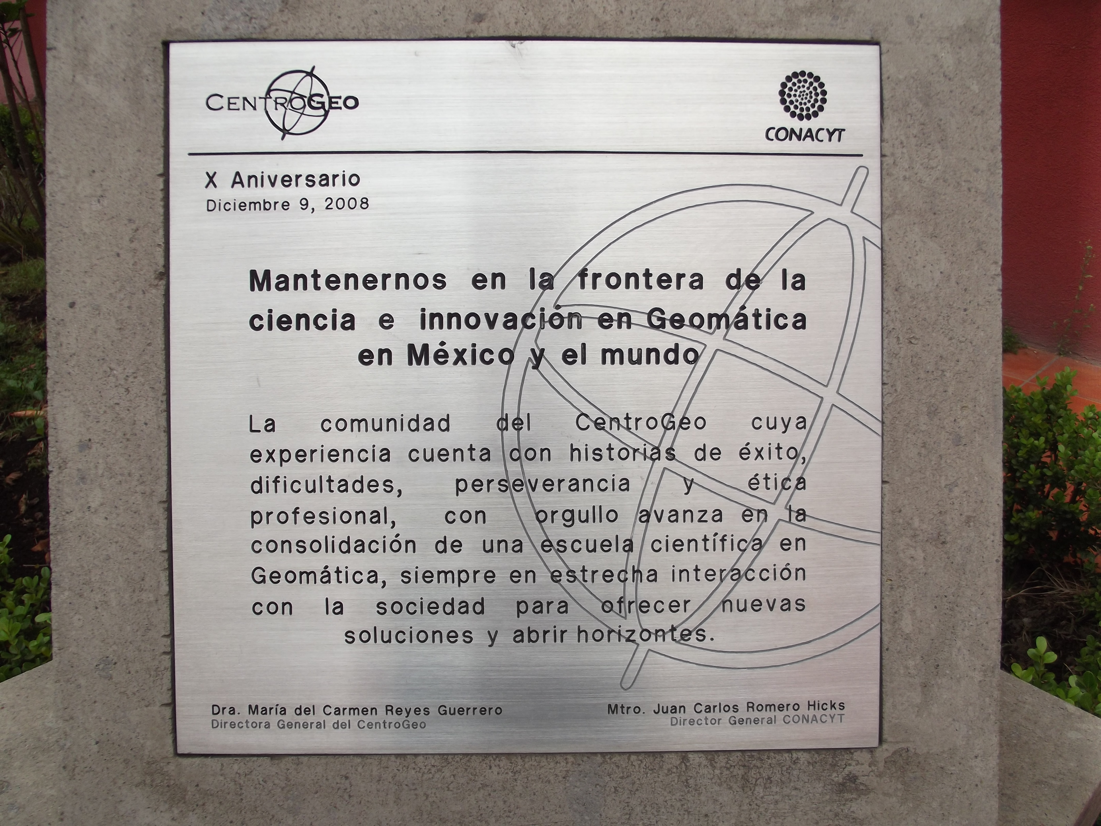 CentroGeo.